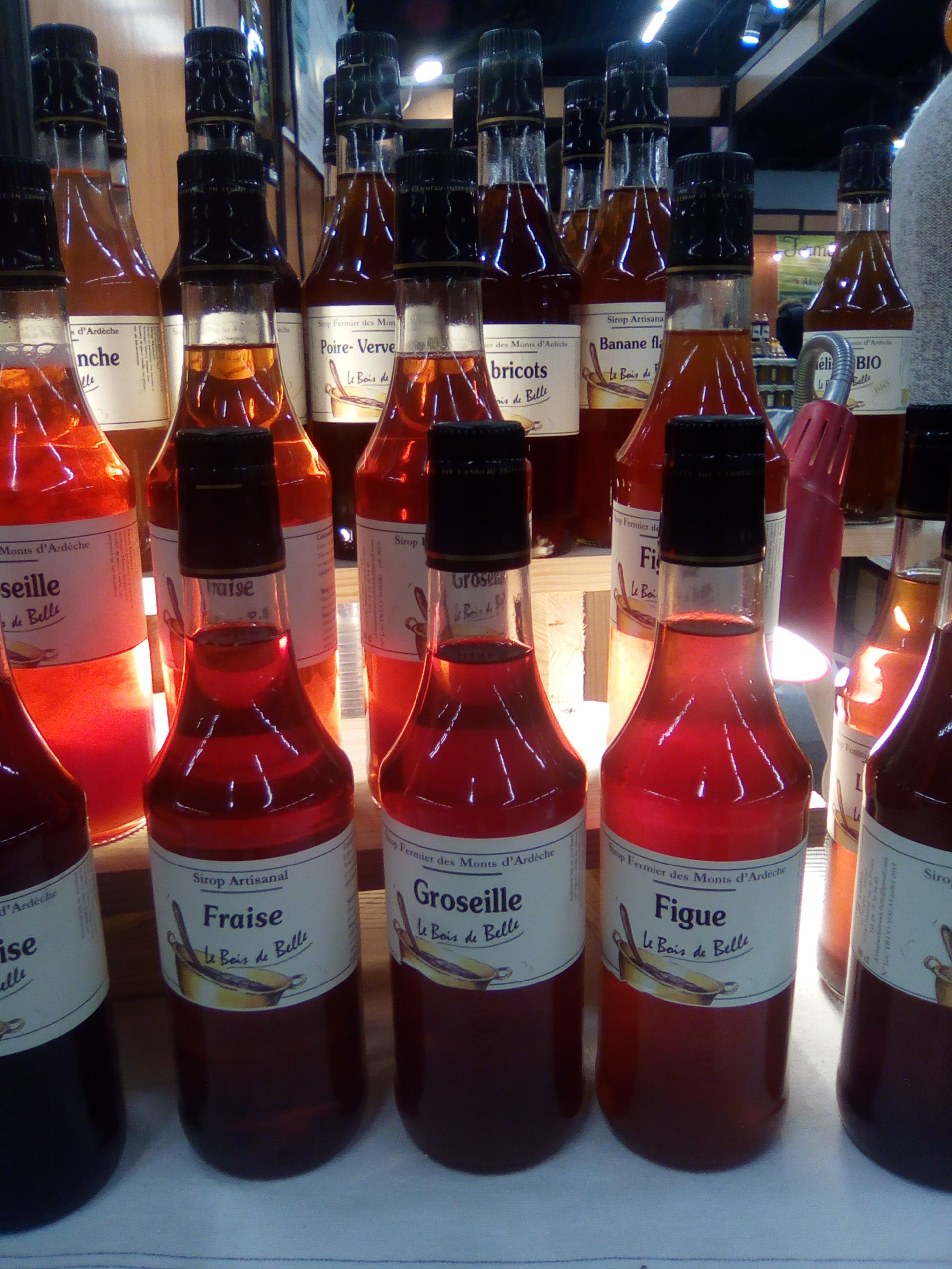 Salon Pari fermier au Parc floral de Paris.